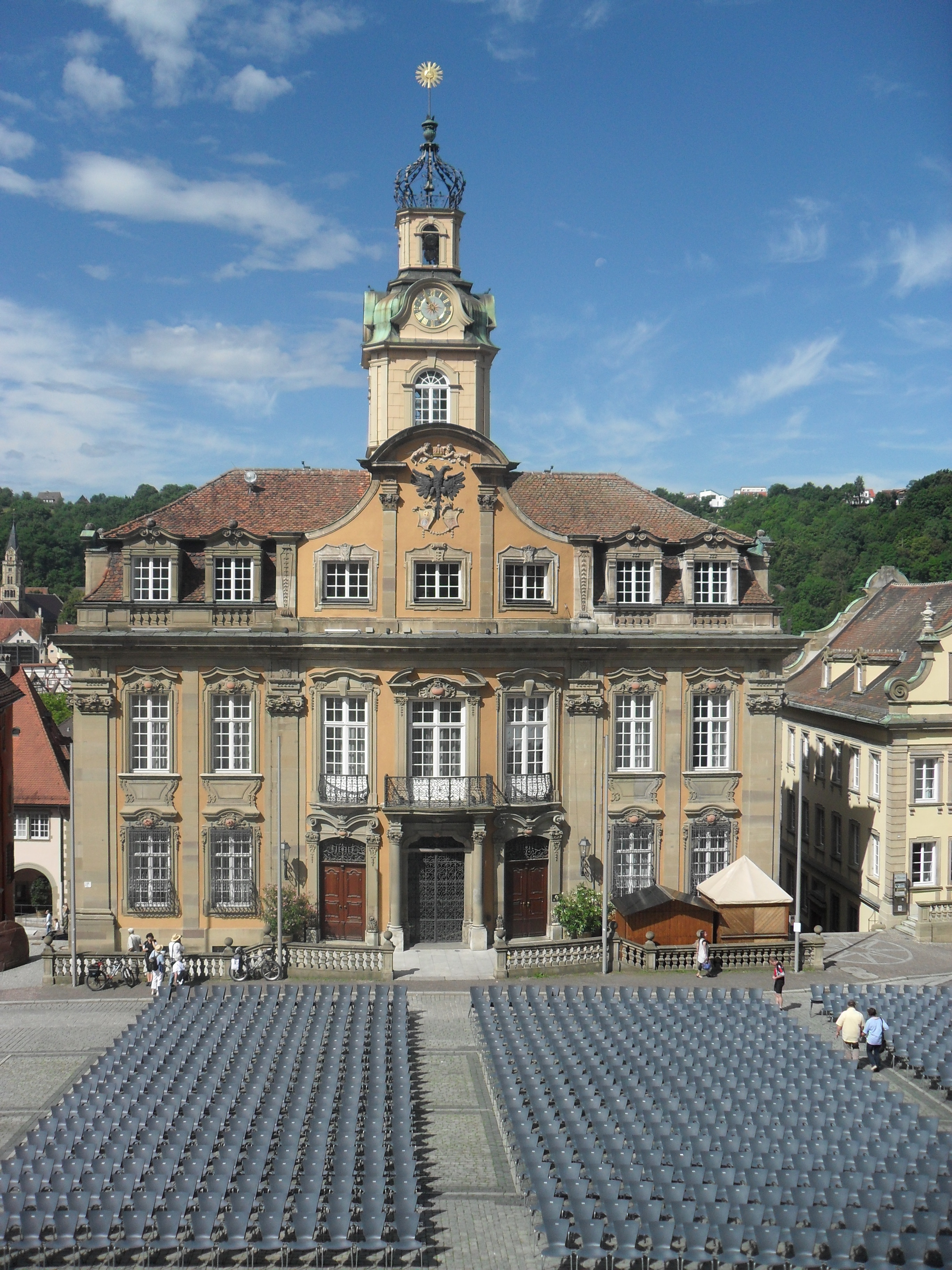 Das Wetter mag sein, wie es will, das Rathaus der Stadt Schwäbisch Hall erstrahlt in hellem Glanz. In Gold getaucht, bildet die Strahlenscheibe die Spitze des Turms mit seinen vier Uhrblättern und seiner schmiedeeisernen Krone. Genauso prächtig zeigt sich das Gebäude im Ganzen. Säulen und Girlanden, Bögen und Kugeln prägen die reich geschmückten Fassaden. Im Stil des Barock wurde 1732 der Grundstein gelegt, 1735 wurde das Rathaus eingeweiht und schließt seither den Marktplatz unterhalb der St. Michaelskirche nach Westen hin ab.